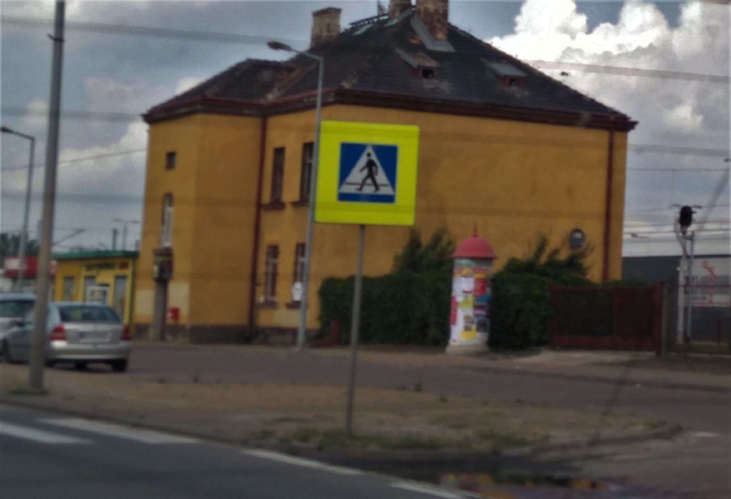 Budynek, w którym mieszkali kolejarze